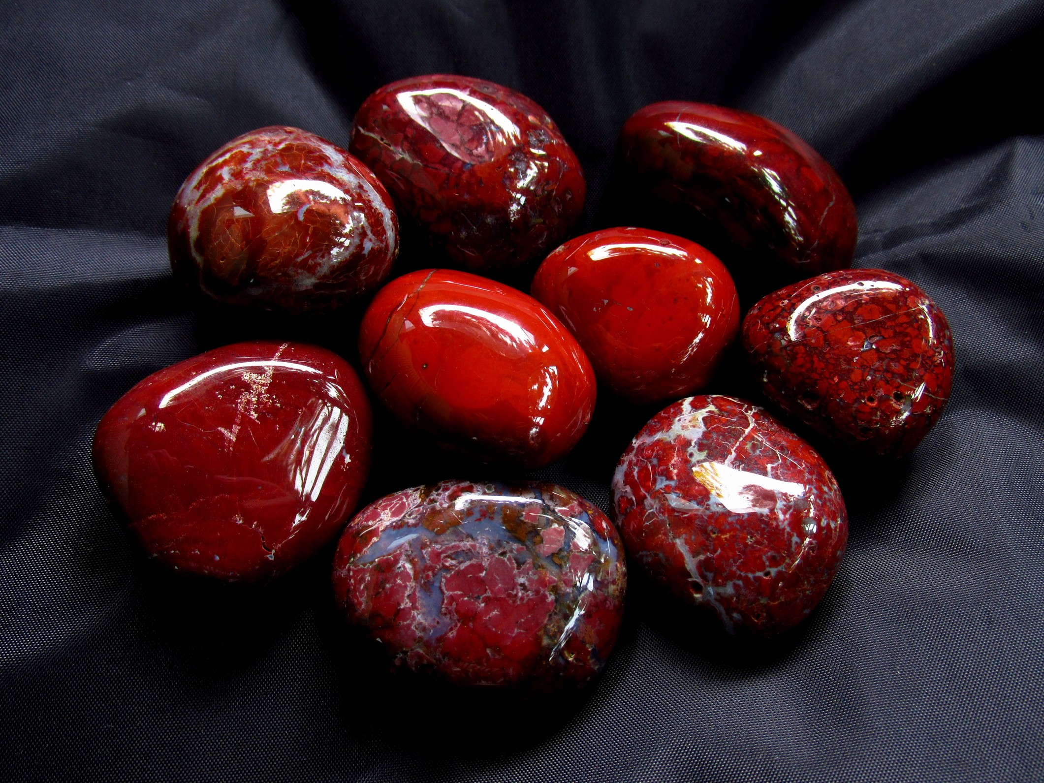 Red Jasper , Tugaru Nishikiishi Japan , 津軽地方の七里長浜で産出する錦石の赤碧玉を研磨したもの。日本列島の日本海側に沿って走る第三紀層がこれら碧玉を含んでいると本業の方から聞きました。